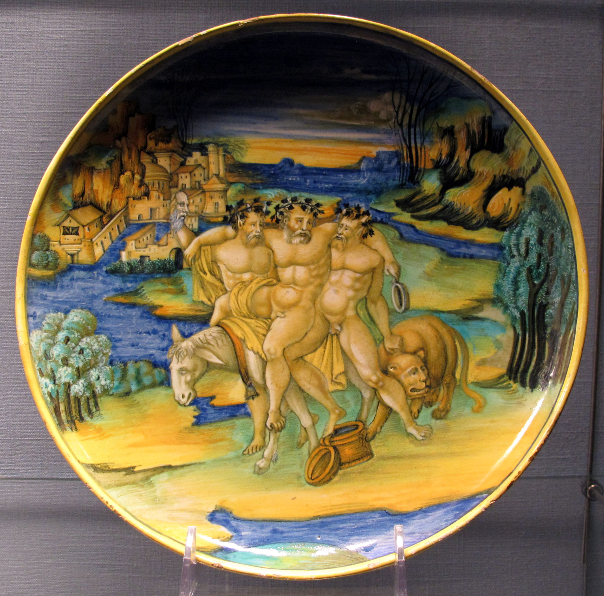 Maiolica nel Metropolitan Museum of Art